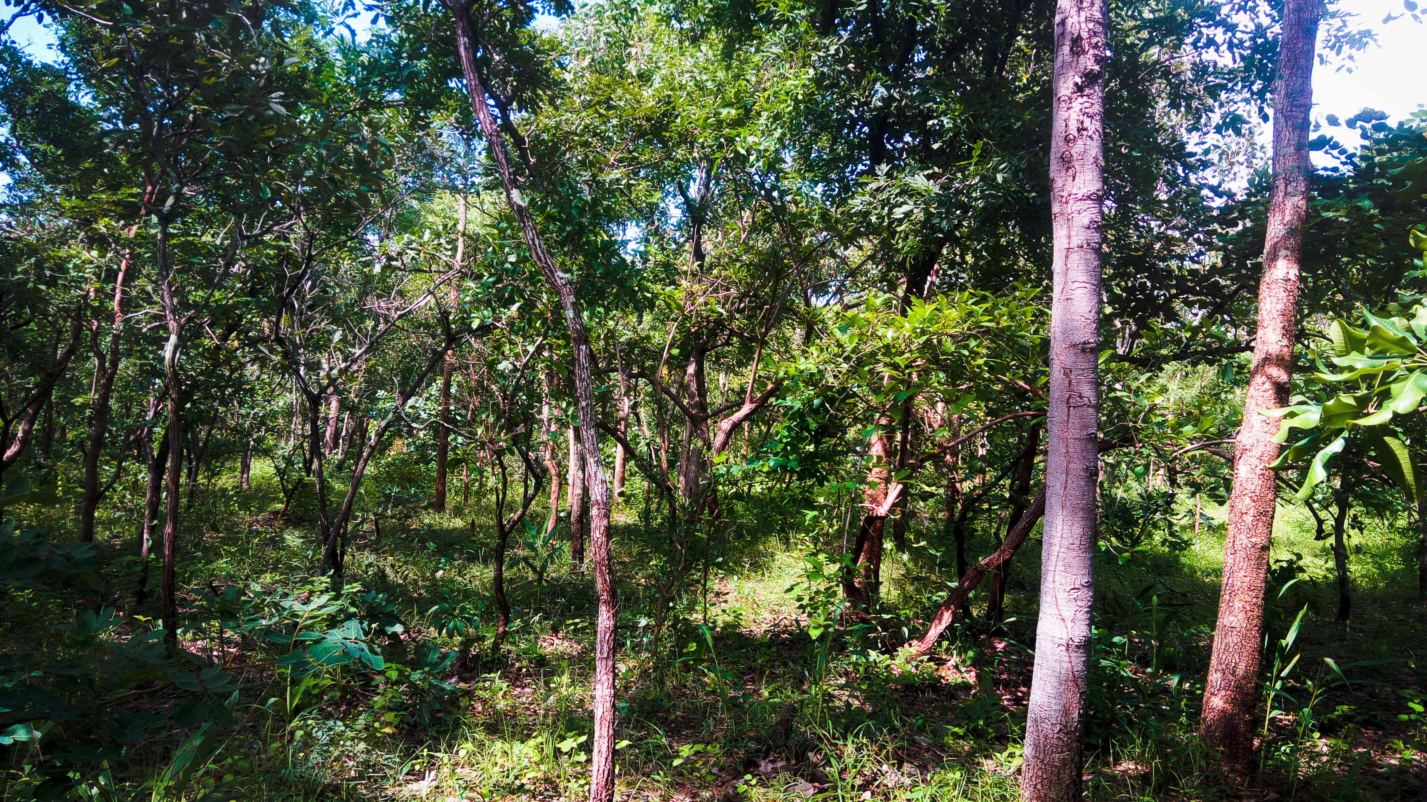 L'image montre un peu la strate dominante de la foret. Elle est essentiellement dominée par les espèces de la famille d'Isoberlinia qui sont de très bon partenaires des champignons ectomychoriziens.